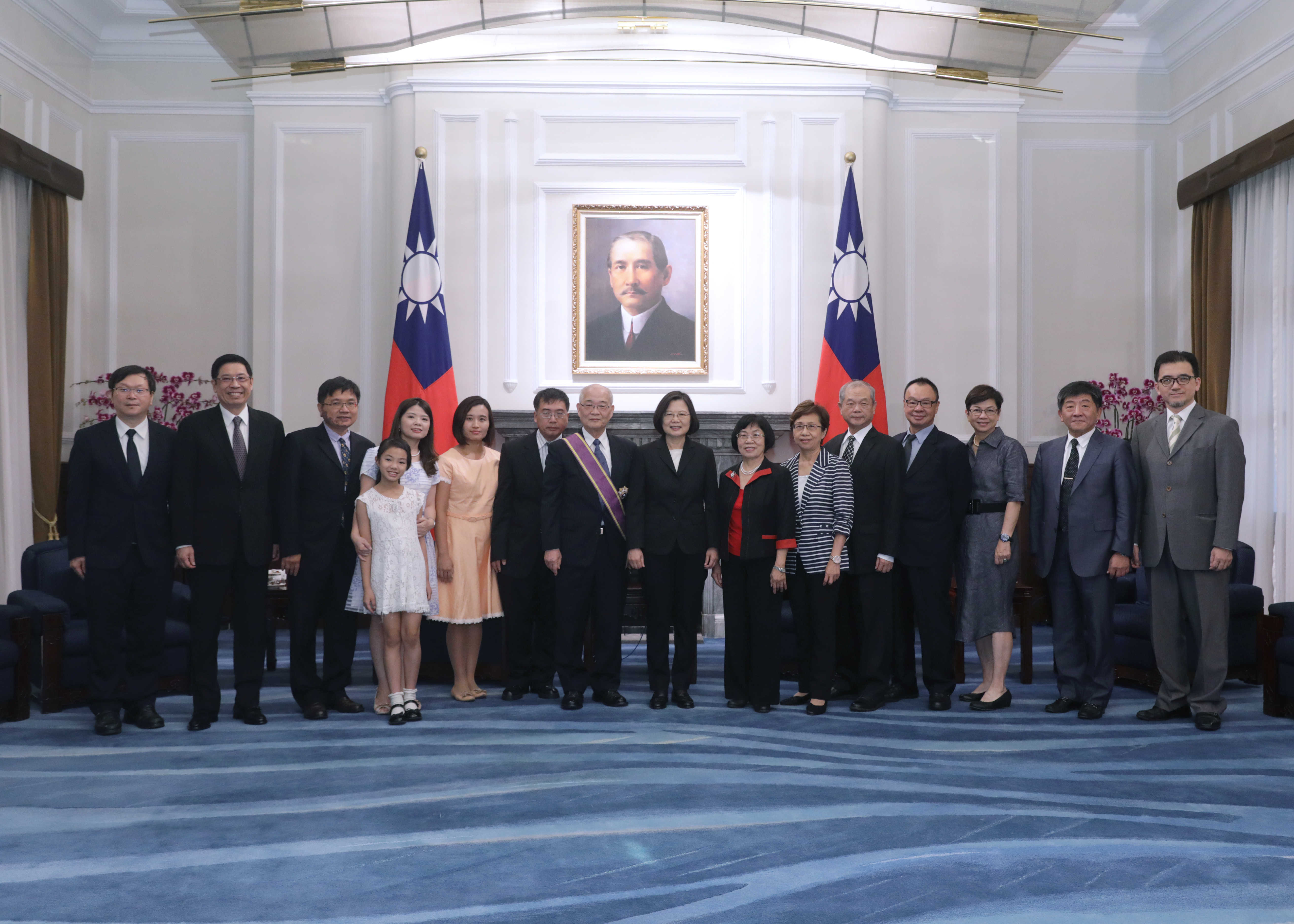 總統頒授陳定信院士景星勳章 表彰推展B肝防治的貢獻